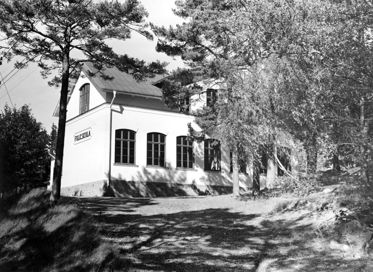 Lövstaskolan. Skolan togs i bruk 1903. Nedlagd 1939. Har senare använts som ungdomsgård. I förgrunden uppfarten från Kyrkhamnsvägen från söder. Bildnr 01381.